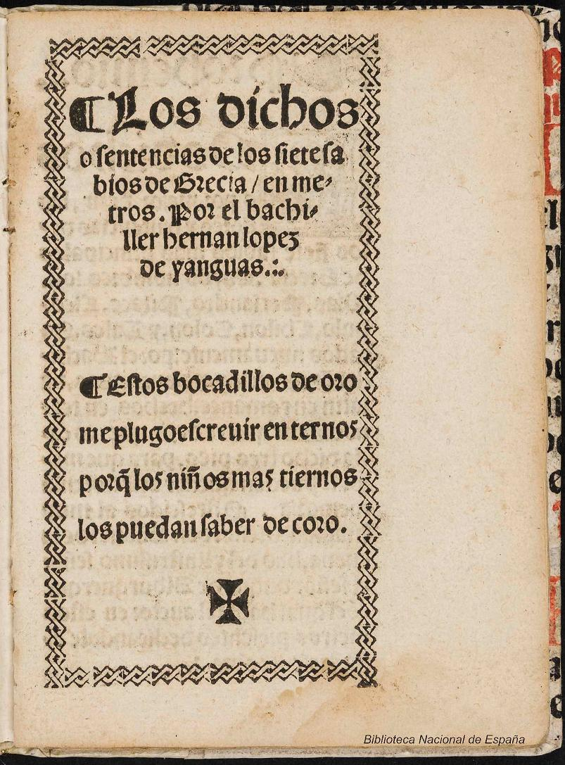 Los dichos o sentencias de los siete sabios de Grecia, en metros por el bachiller Hernan Lopez de Yanguas ; estos bocadillos de oro me plugo escreuir en ternos porq[ue] los niños mas tiernos los puedan saber de coro Autor: López de Yanguas, Hernán Fecha: 1542 Datos de edición: En ... Medina del Campo, en casa de Pedro de Castro